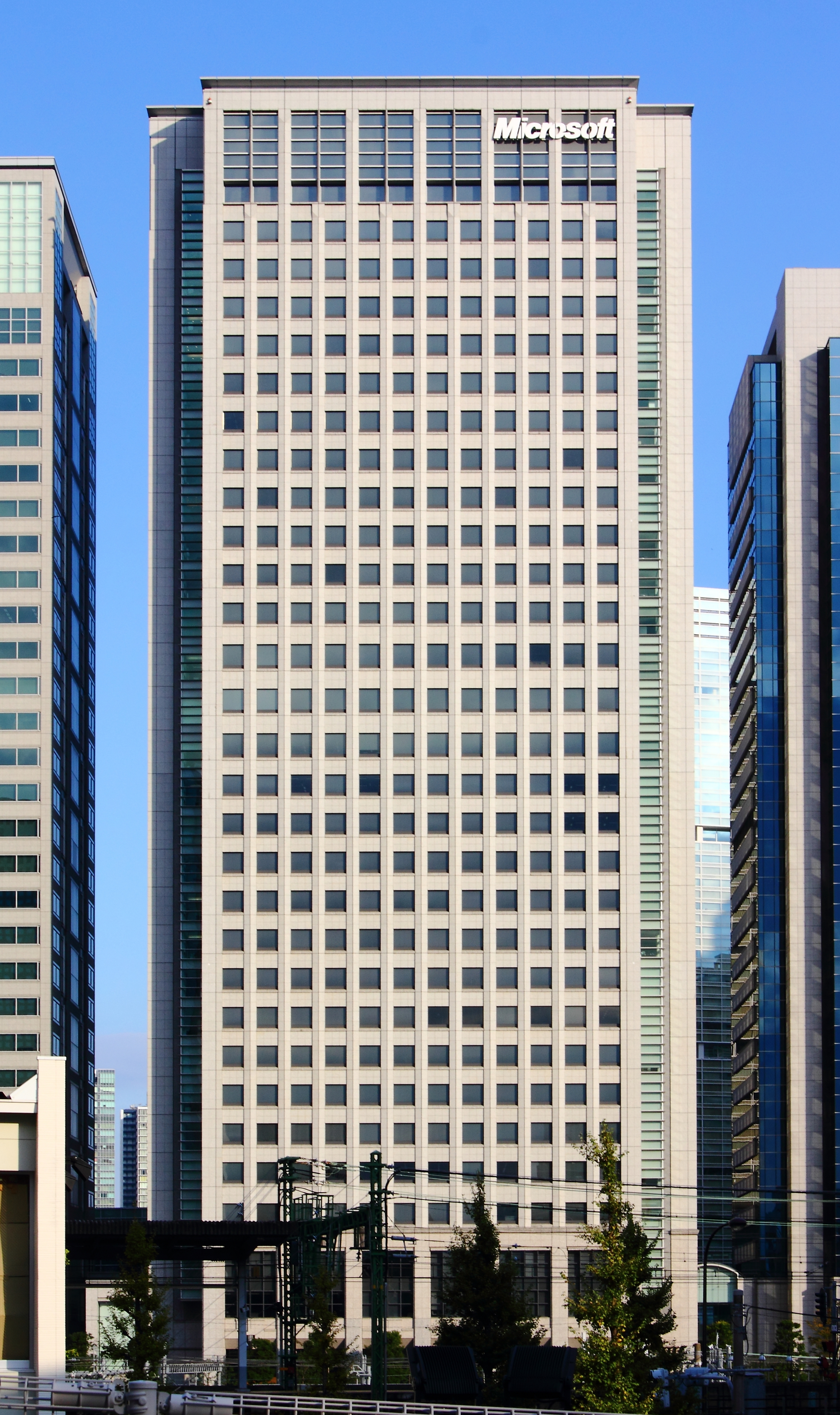 品川グランドセントラルタワー、日本マイクロソフト本社（東京都港区）